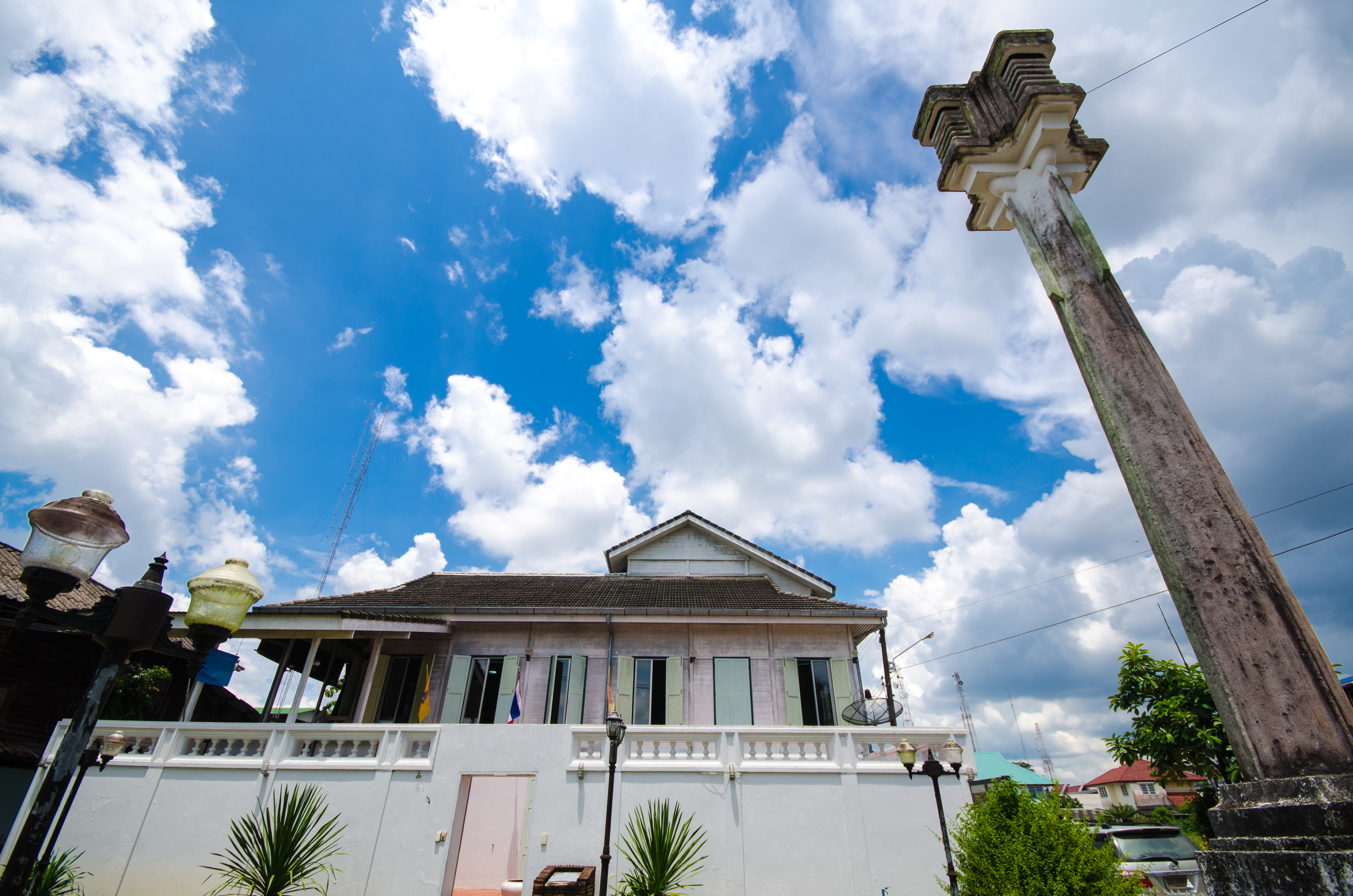 อาคารเรือนไม้ 3 ชั้น (จวนเรซิดังกัมปอร์ต)